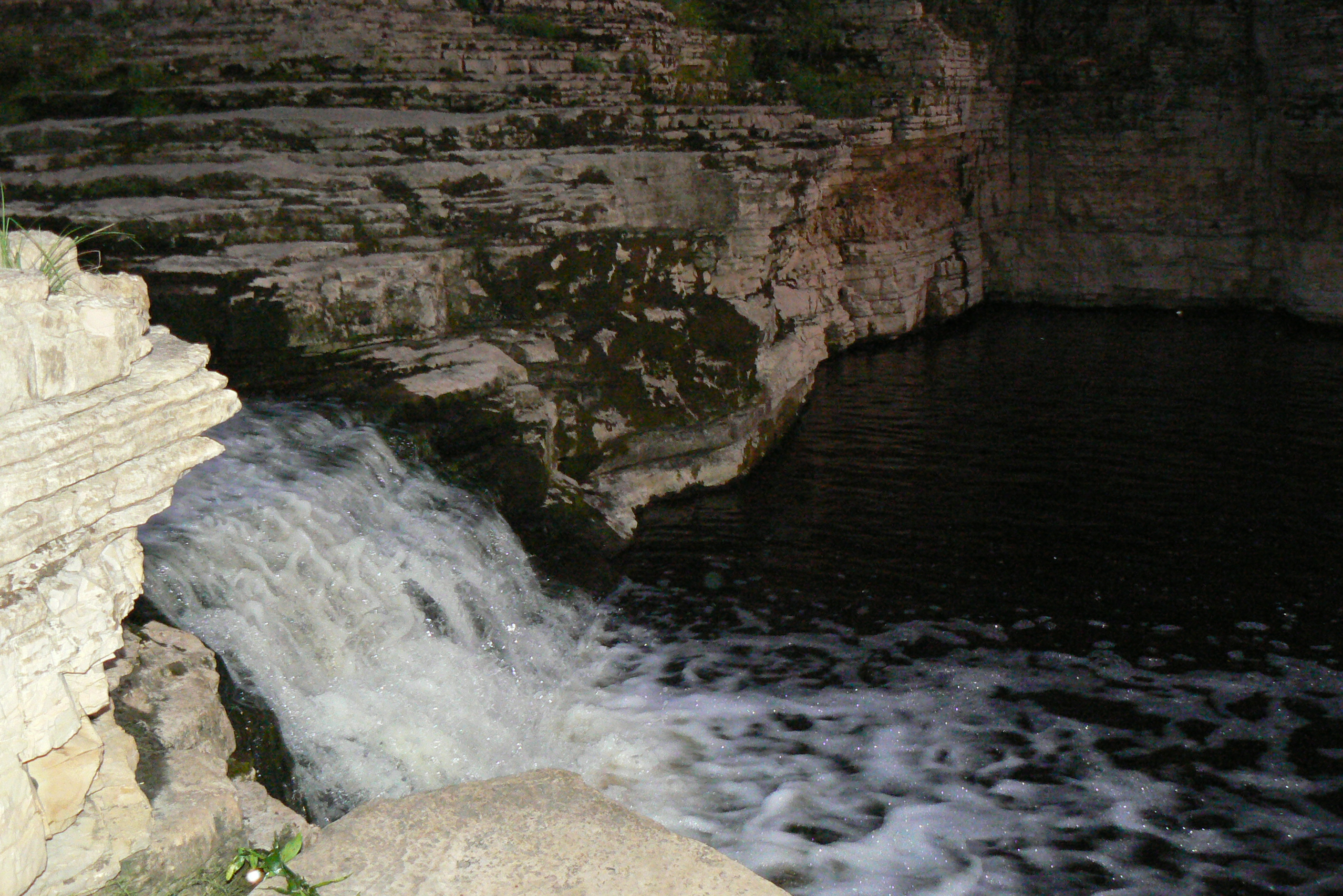 Кюрюлюр, 2011 г